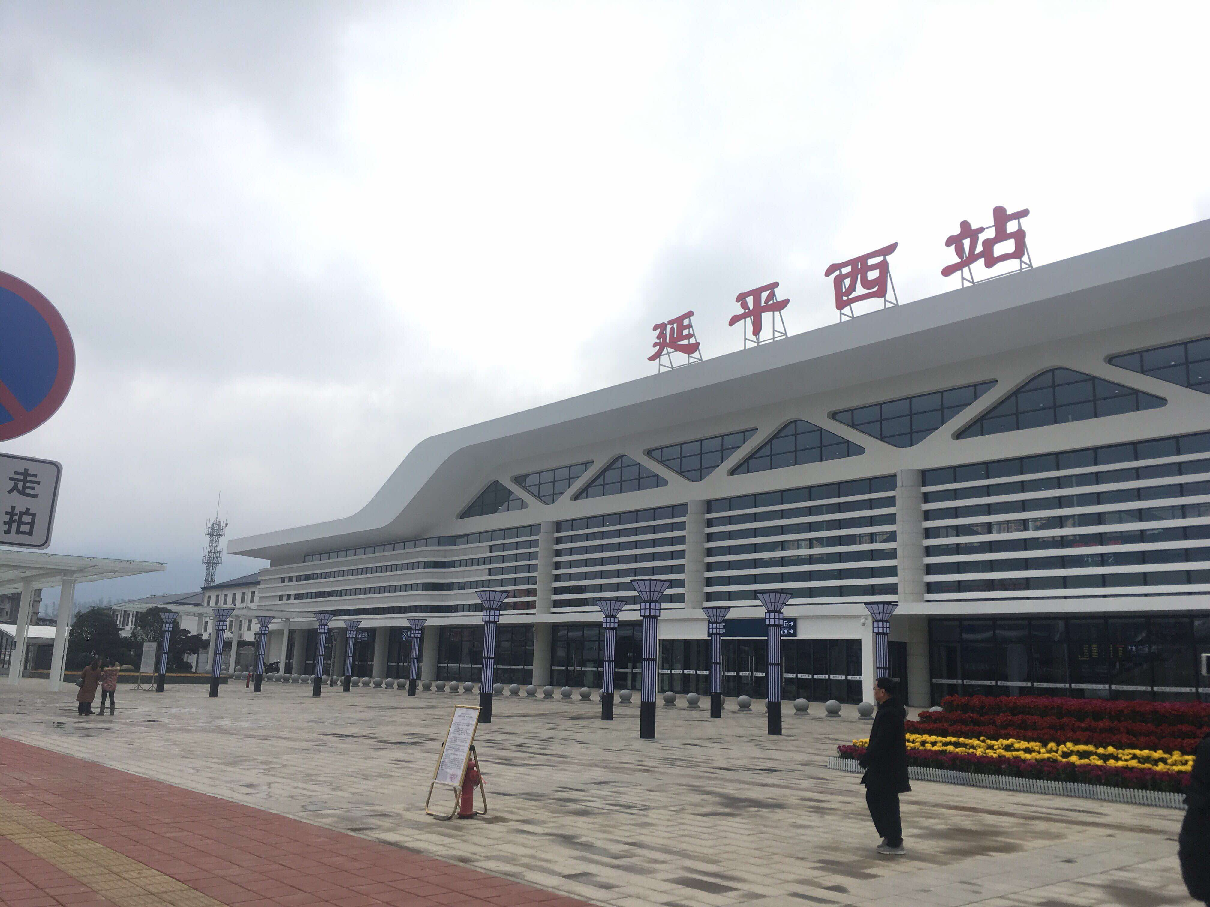 延平西站（摄于20190101）